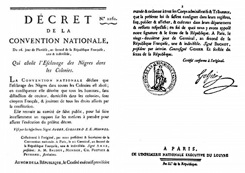 Fac similé du décret d'abolition de l'esclavage du 16 pluviôse an II (4 février 1794). Lire sur Wikisource